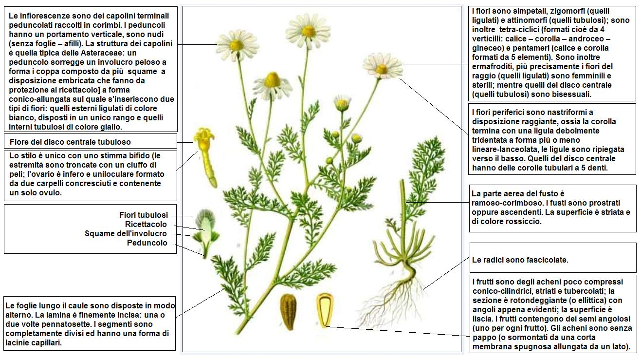 Anthemis cotula Koeh DESC